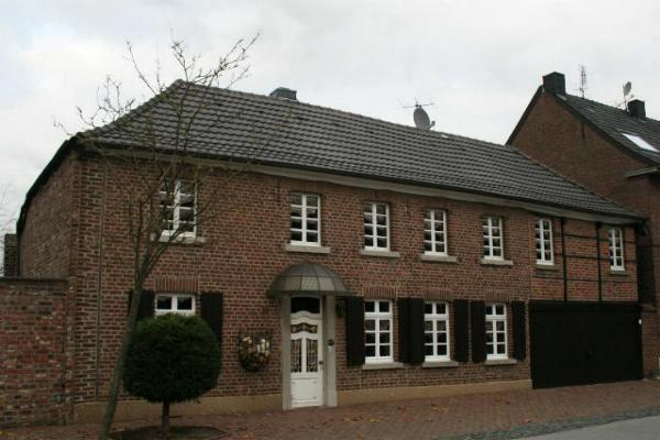 Wohnhaus in Wegberg-Bischofshütte